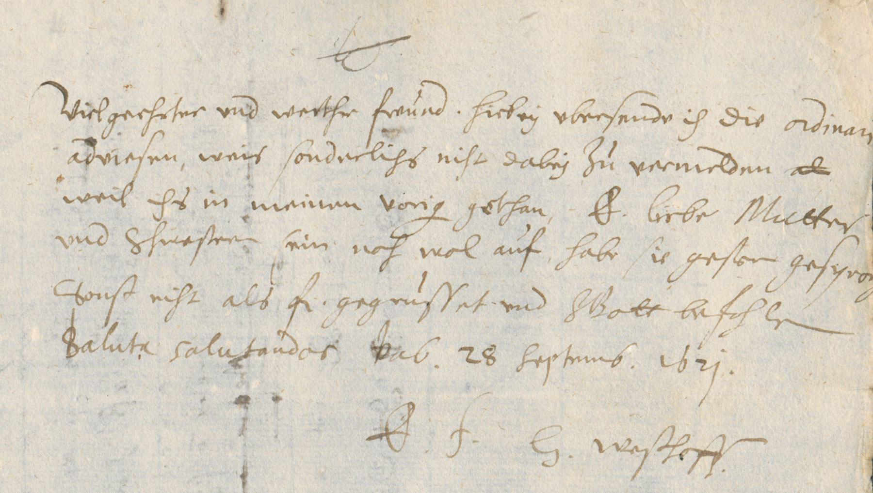 Brief von Hermann Westhoff an Joachim Jungius, 1621, NL Jungius, Stabi Hamburg, NJJ: Pe 11